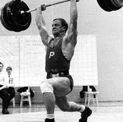 Jouni Kailajärvi